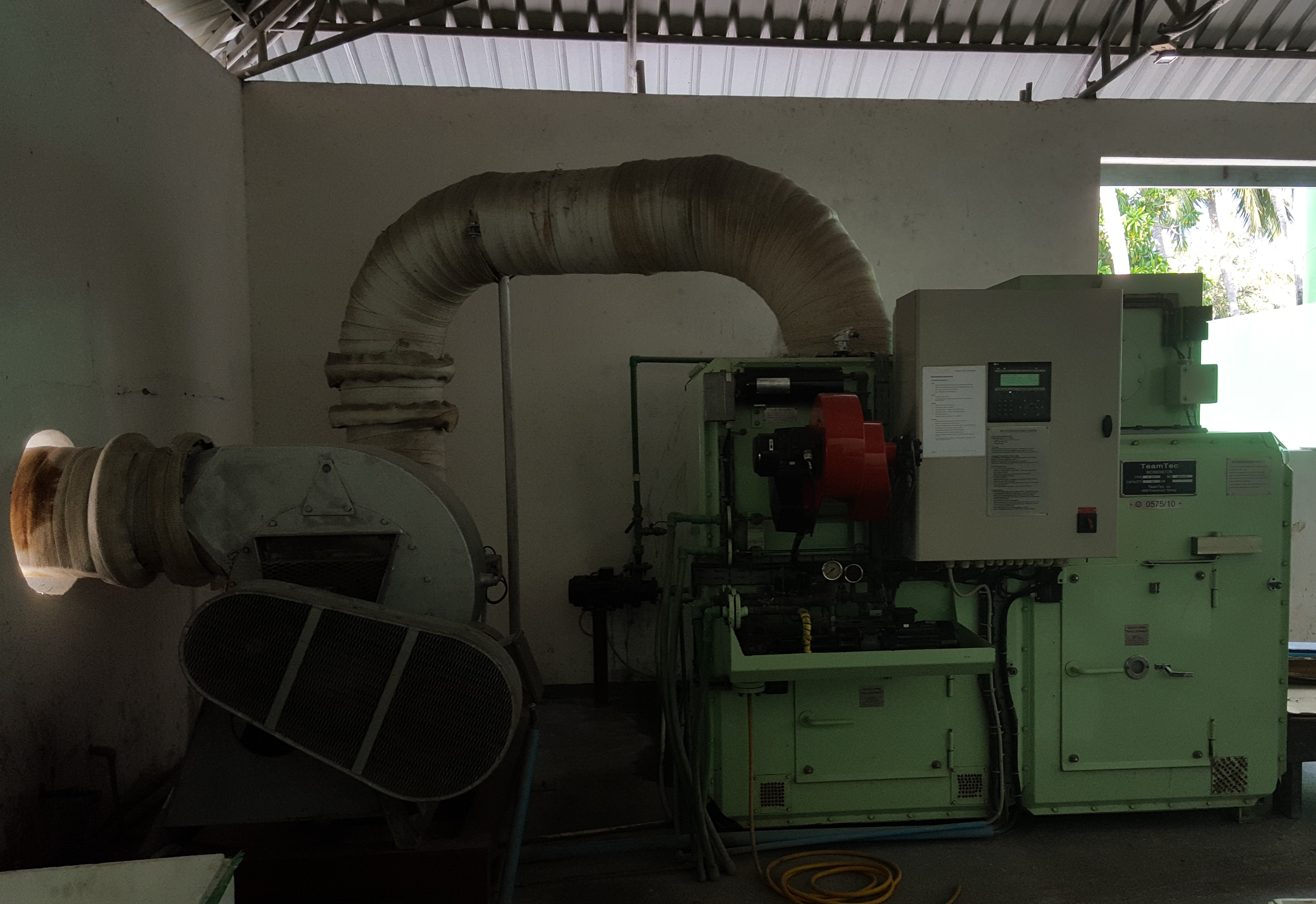 Diese Maschine verbrennt nicht verwertbare Müllstoffe.